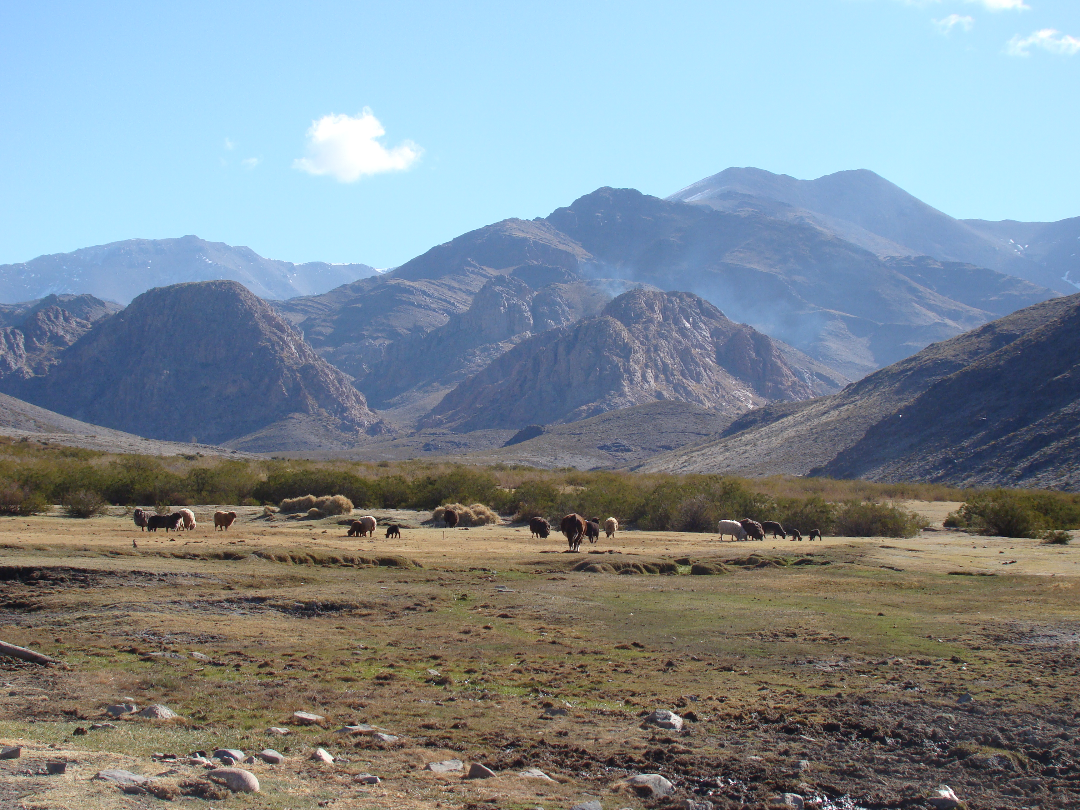 Paraje de Bauchaceta, departamento Iglesia, provincia de San Juan, Argentina